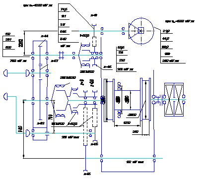 схема